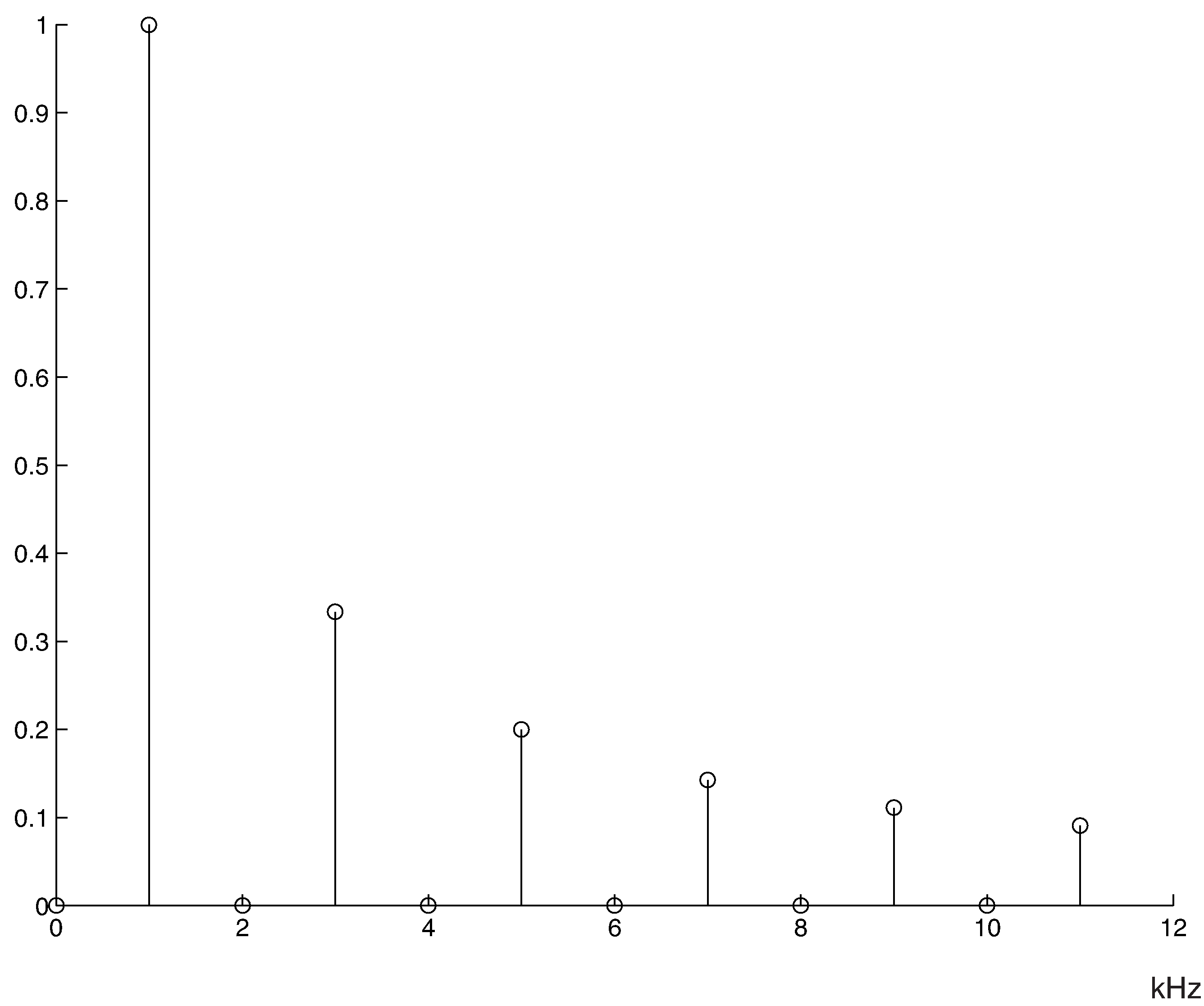 Un signal dans le domaine fréquentiel.